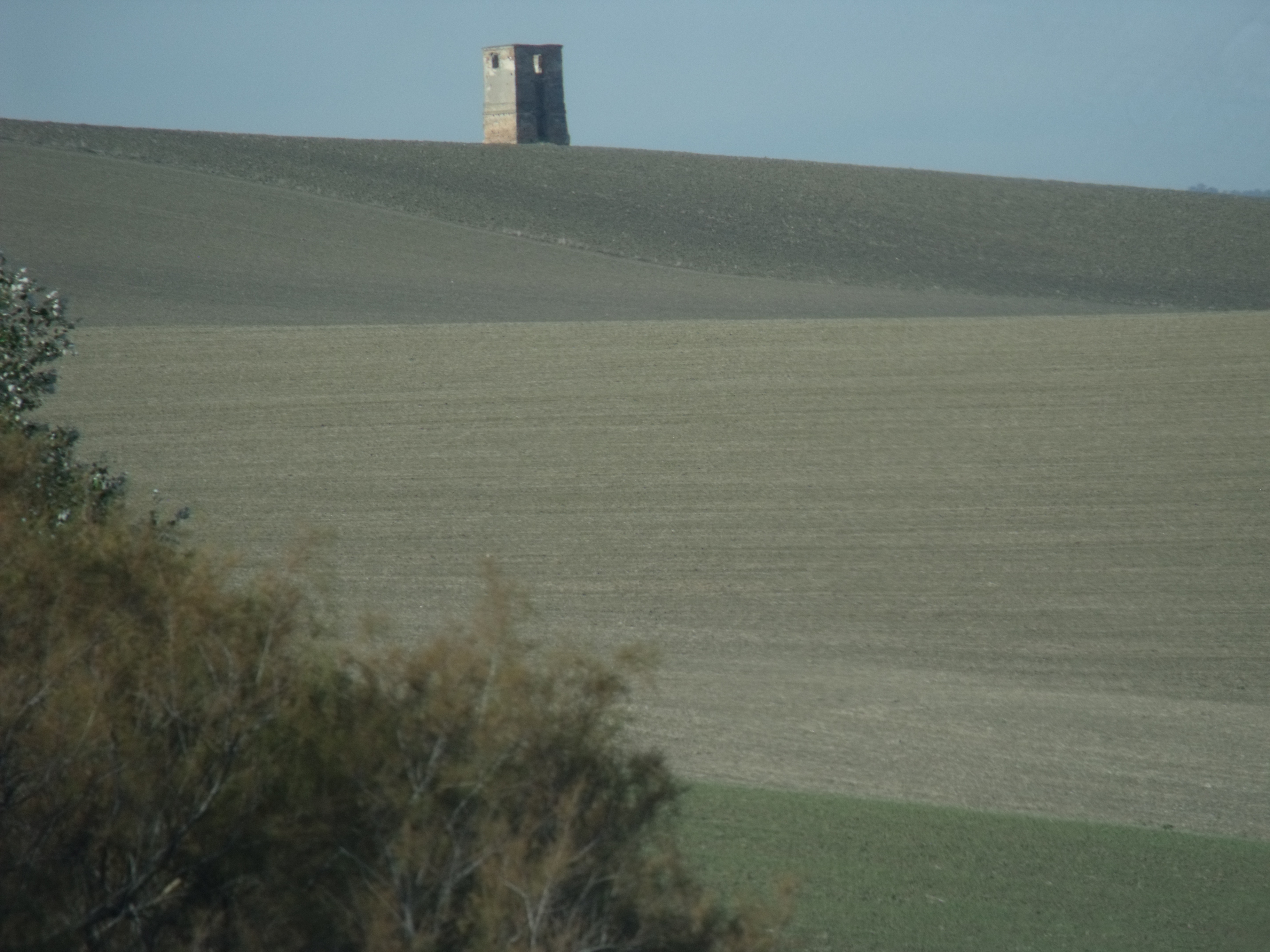 Torre de telegrafía óptica de Chacillerejo, en la carretera A4 en el kilómetro 391 cerca de un centro penitenciario